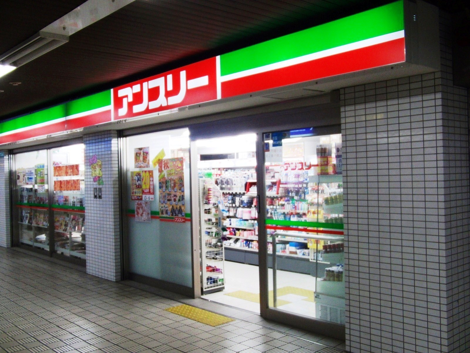 アンスリー淀屋橋店を撮影